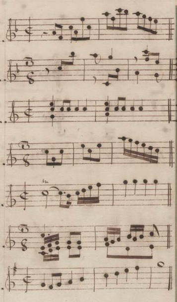 Table du volume X des manuscrits de Venise (incipit des sonates 1 à 7, K. 418 à 424).